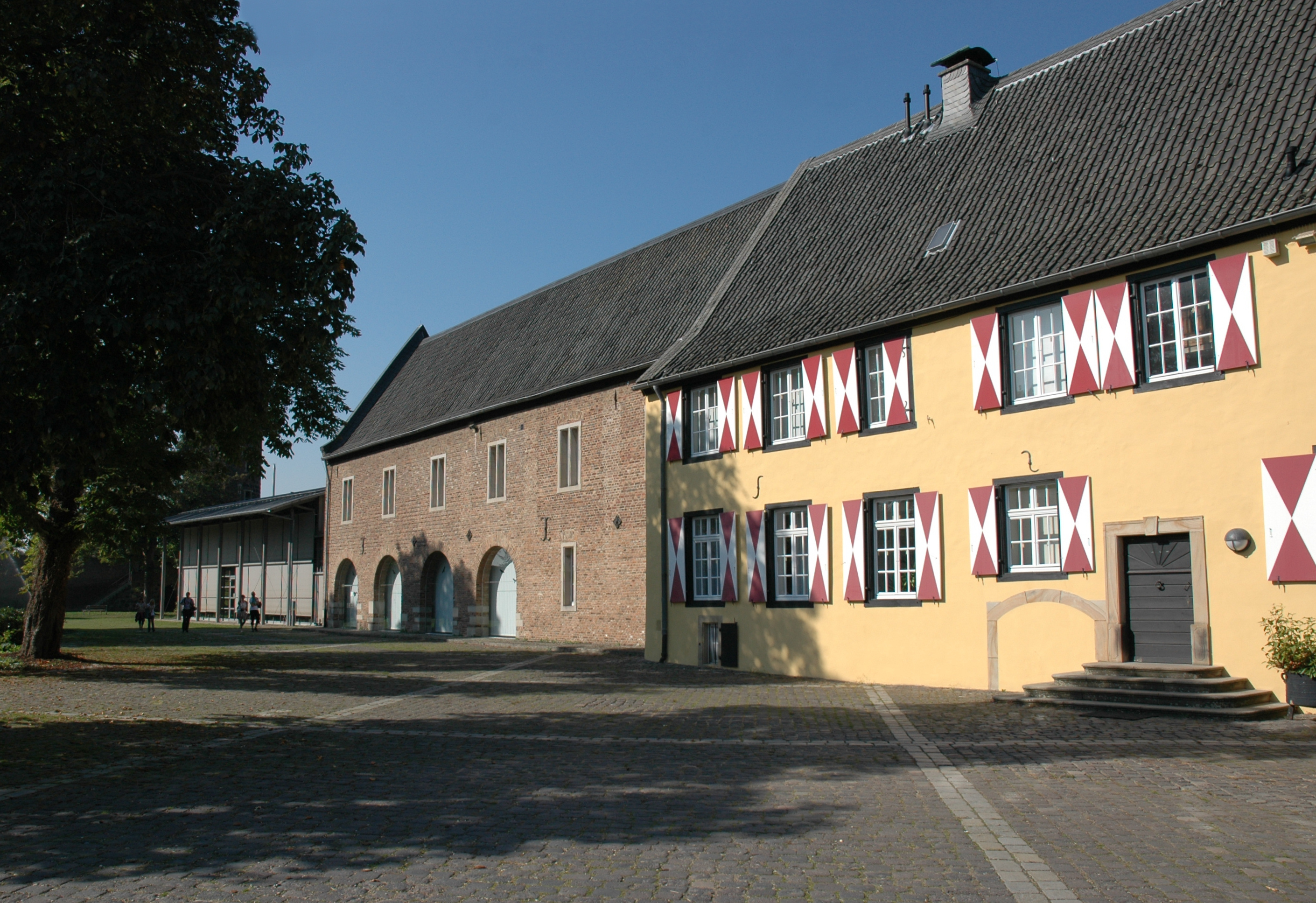 Burg Friedestrom in Dormagen-Zons, Nordseite der Vorburg von Südosten gesehen